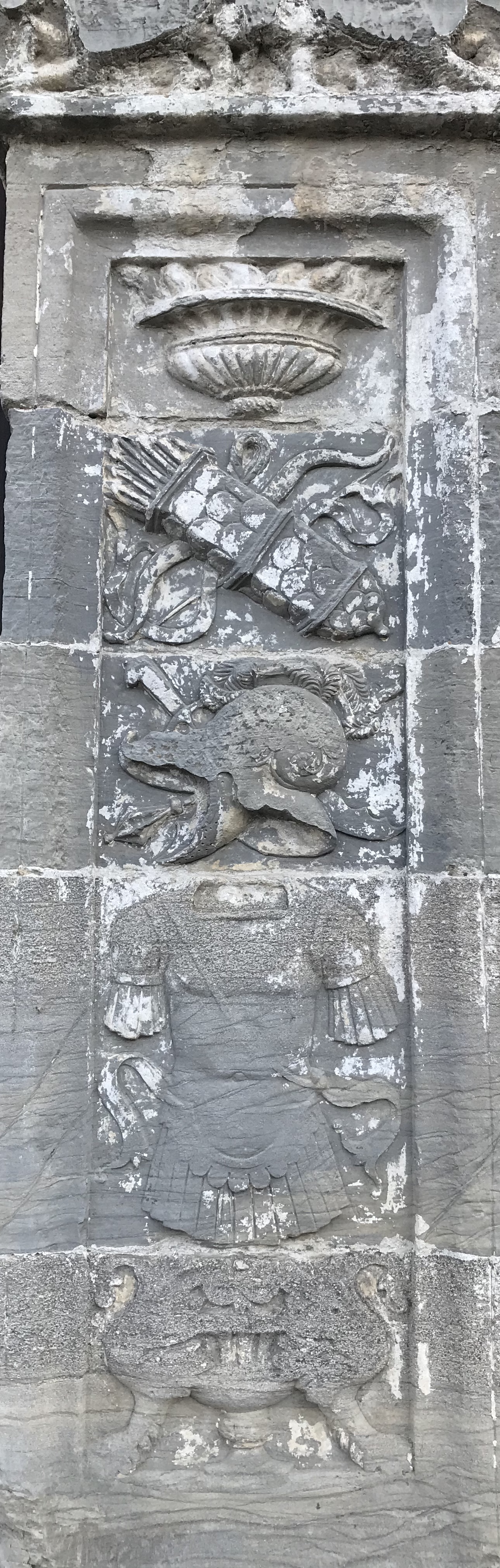 Chiesa di Santa Maria del Soccorso a Caccuri